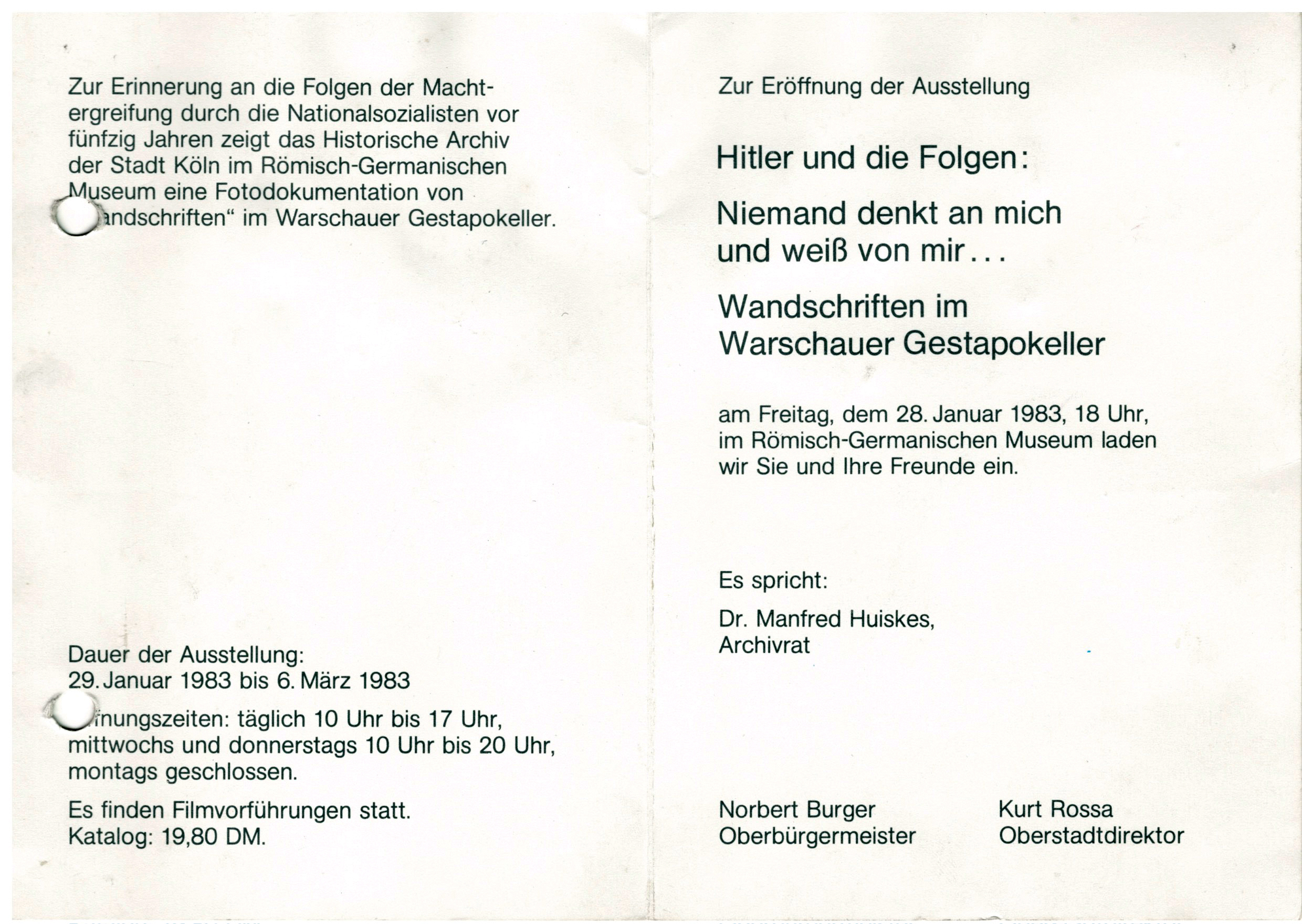 Einladung zur Ausstellungseröffnung am 28.01.1983, Köln, Römisch germanisches Museum.